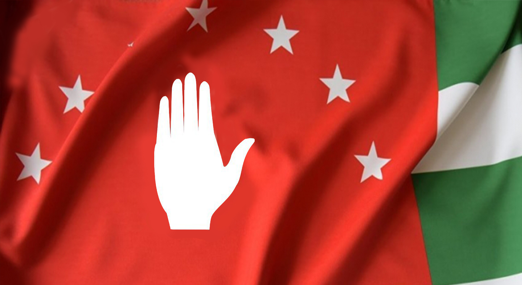 Абаза